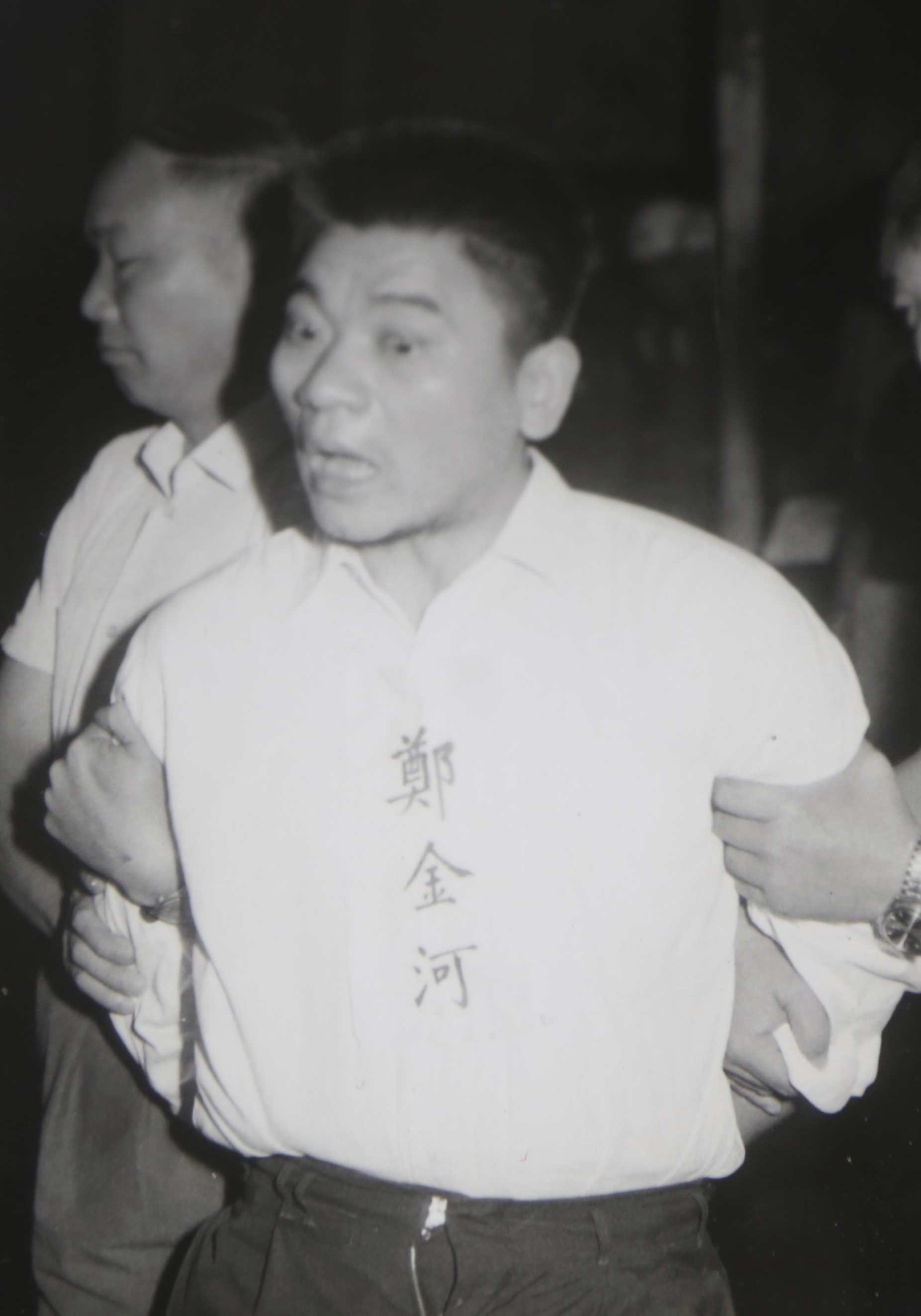 中文（台灣）: 鄭金河遭槍決前照片